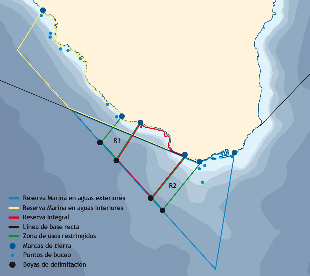 Mapa de las partes de la reserva marina del Mar de Las Calmas, isla de El Hierro, Islas Canarias